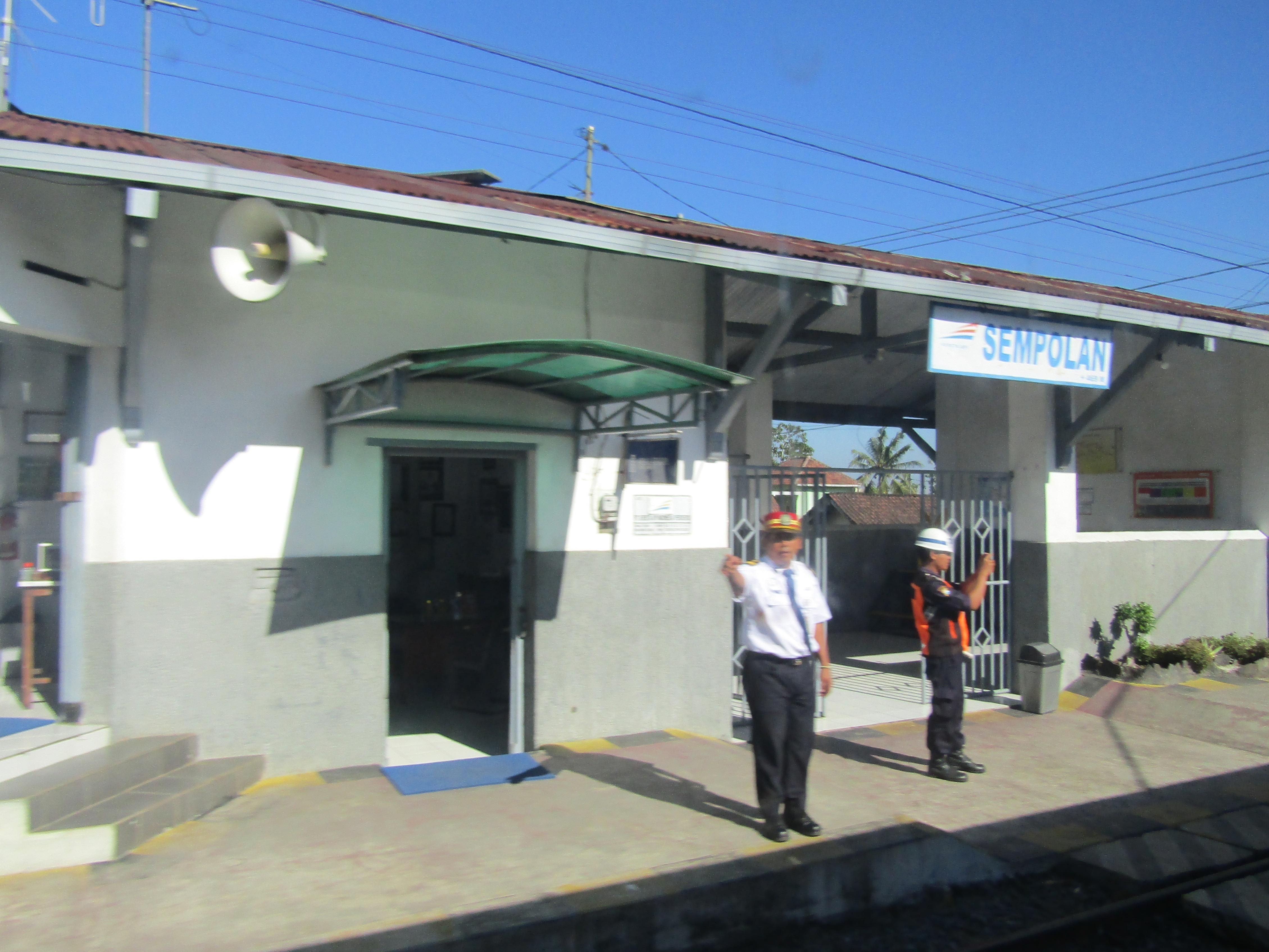 Bangunan utama Stasiun Sempolan dan PPKA yang memperagakan tunjuk-sebut